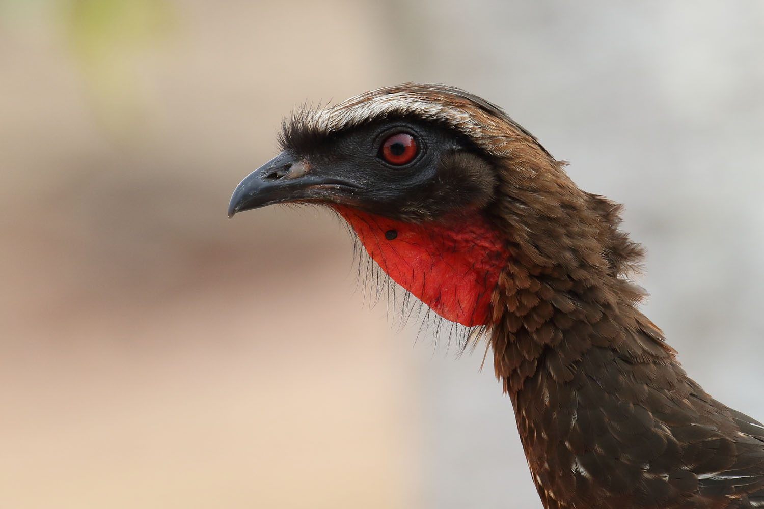 Pénélope à ventre roux, Pantanal (Brésil)